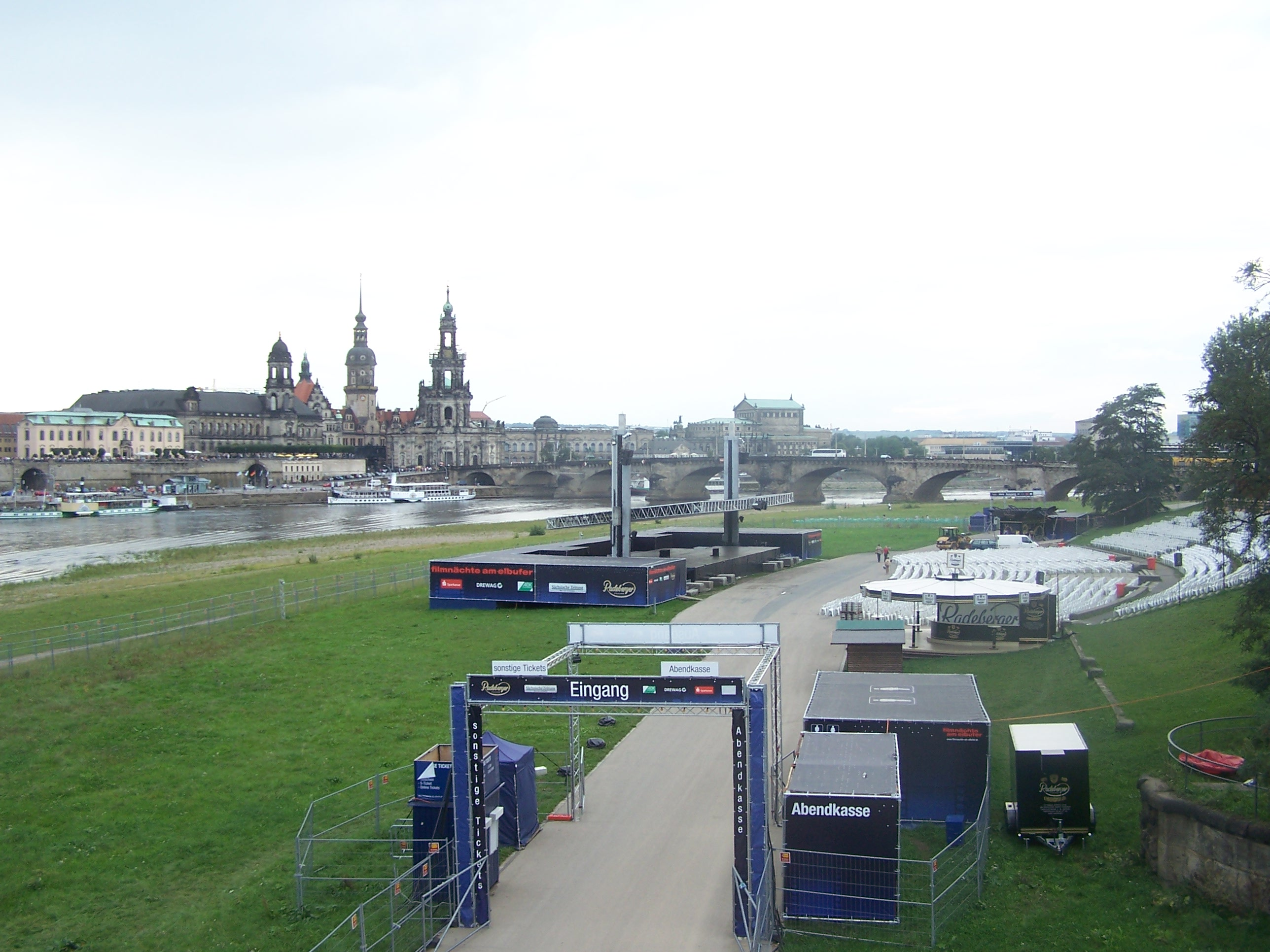 Gelände der "Filmnächte am Elbufer" in Dresden tagsüber, im Hintergrund Altstadt-Panorama